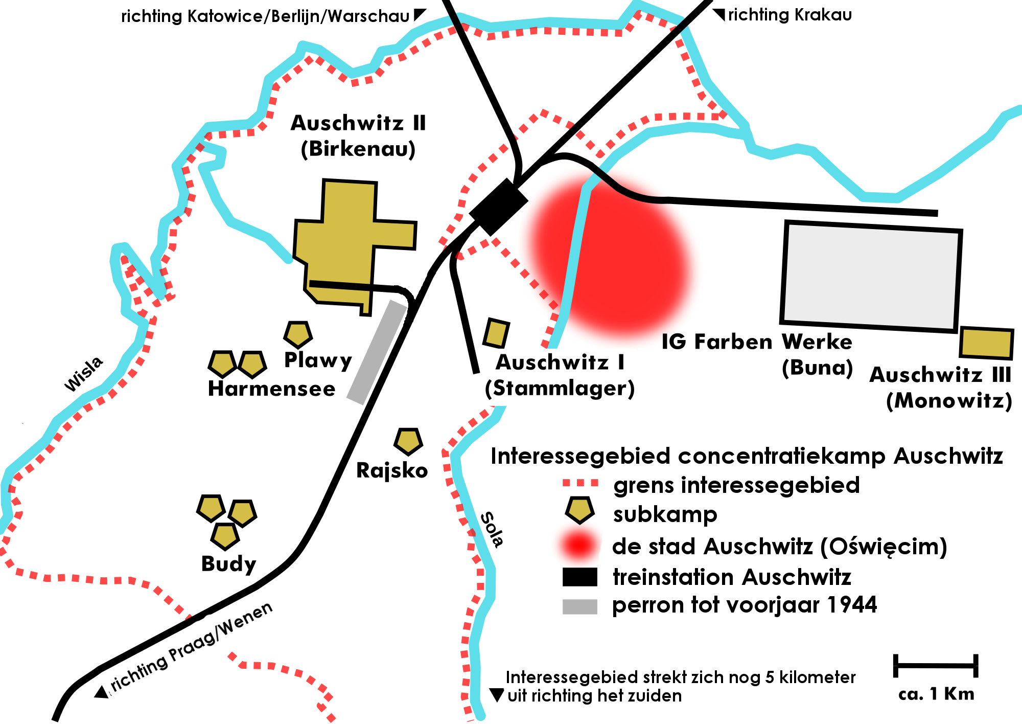 Kaart van het interessegebied van Auschwitz. Lettertype: Century Gothic Bold